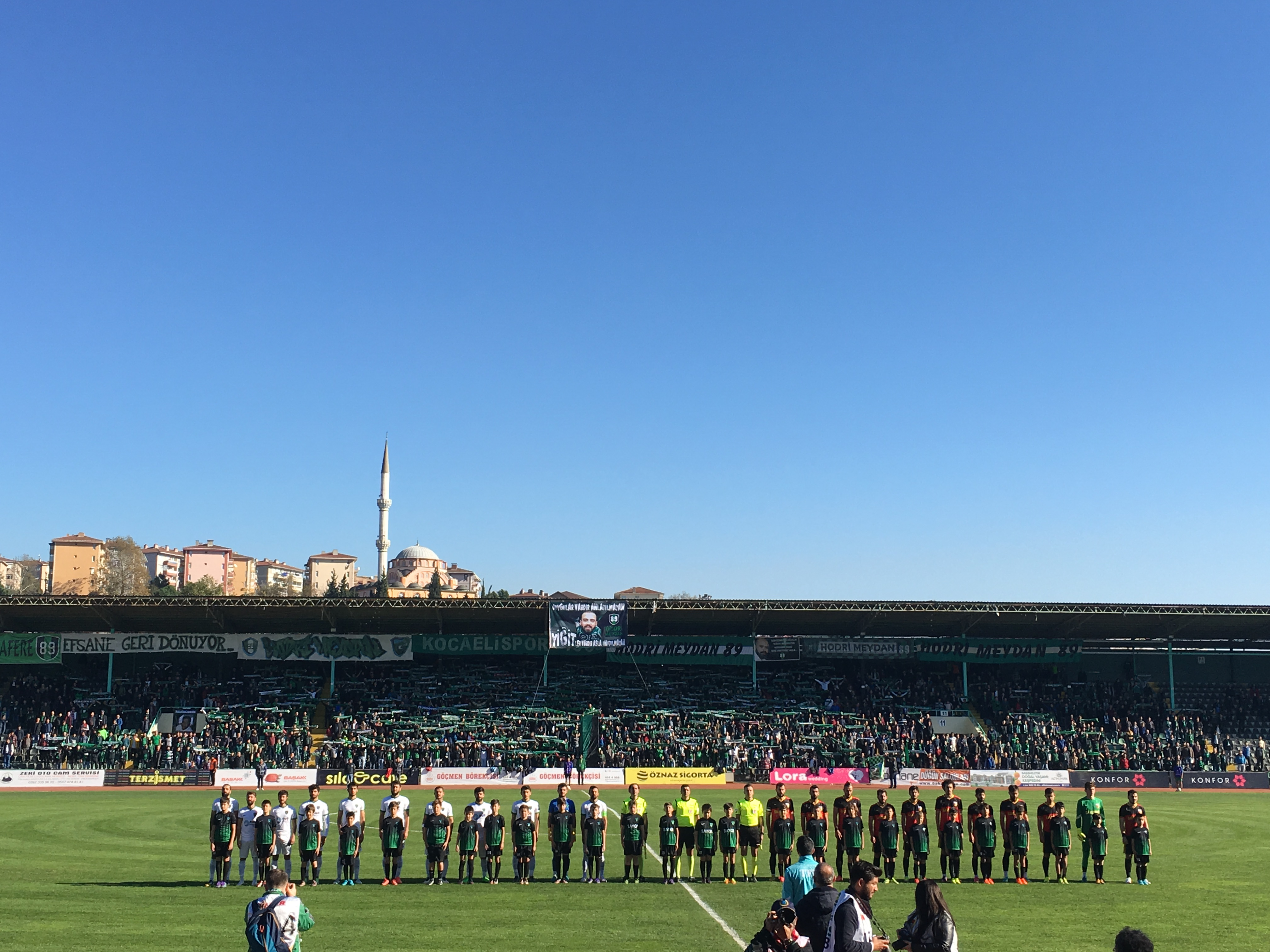 Kocaelispor 35 - Yusuf Şenlik, 2 - Kadir Gezer, 3 - Kadir Öğe, 4 - Murat Soner Başak, 8 - Sefa Narin, 12 - Mesut Özdemir, 41 - Hamza Mutlu, 50 - Ali Keten, 6 - Mert Yavuz, 11 - Sinan Pektemek, 62 - Şenol Yıldırım Kızılcabölükspor 1 - Abdullah Nanim, 2 - Semih Ceylan, 3 - Tayfun Sabri Gümüşoğlu, 10 - Mustafa Altun, 15 - Kerim Bölük, 16 - Ramazan Erarslan, 4 - Özer Ercili, 13 - Taygun Vurgun, 7 - Reha Yaylı, 14 - Emir Can Sayar, 17 - Fatih Arat Hakemler: Cihat Çelikdağ, Erhan Gündoğdu, Ömer Lütfü Aydın